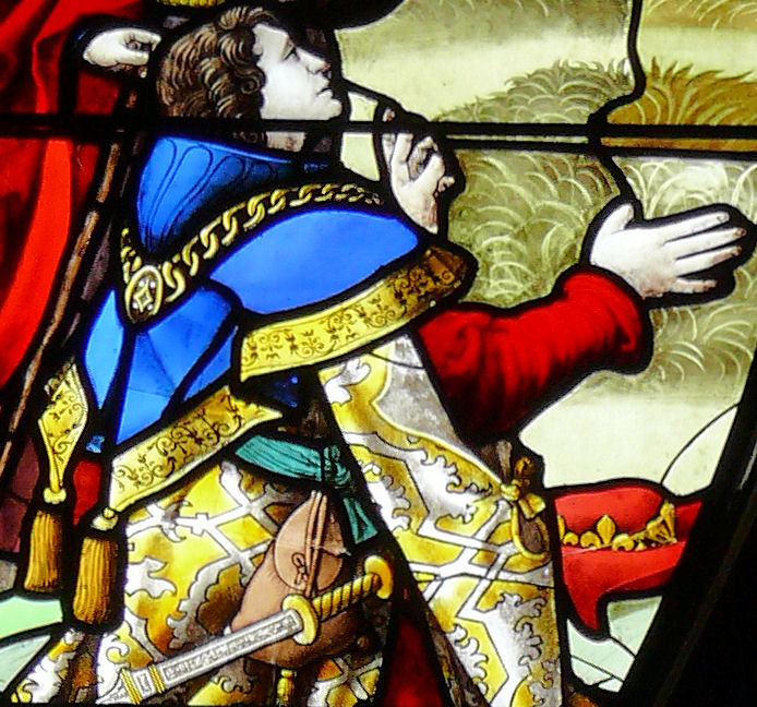 Paris - Eglise Saint-Gervais-Saint-Protais - Verrière de la Sagesse de Salomon - Salomon jeune sacrifiant trois béliers à Yahvé